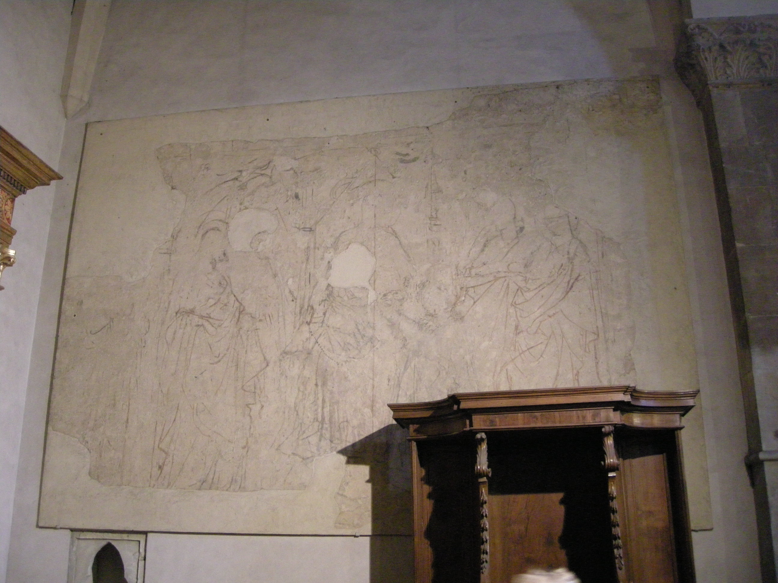 Cappella Cialli-Seringi, spinello aretino, matrimonio mistico di santa caterina, sinopia